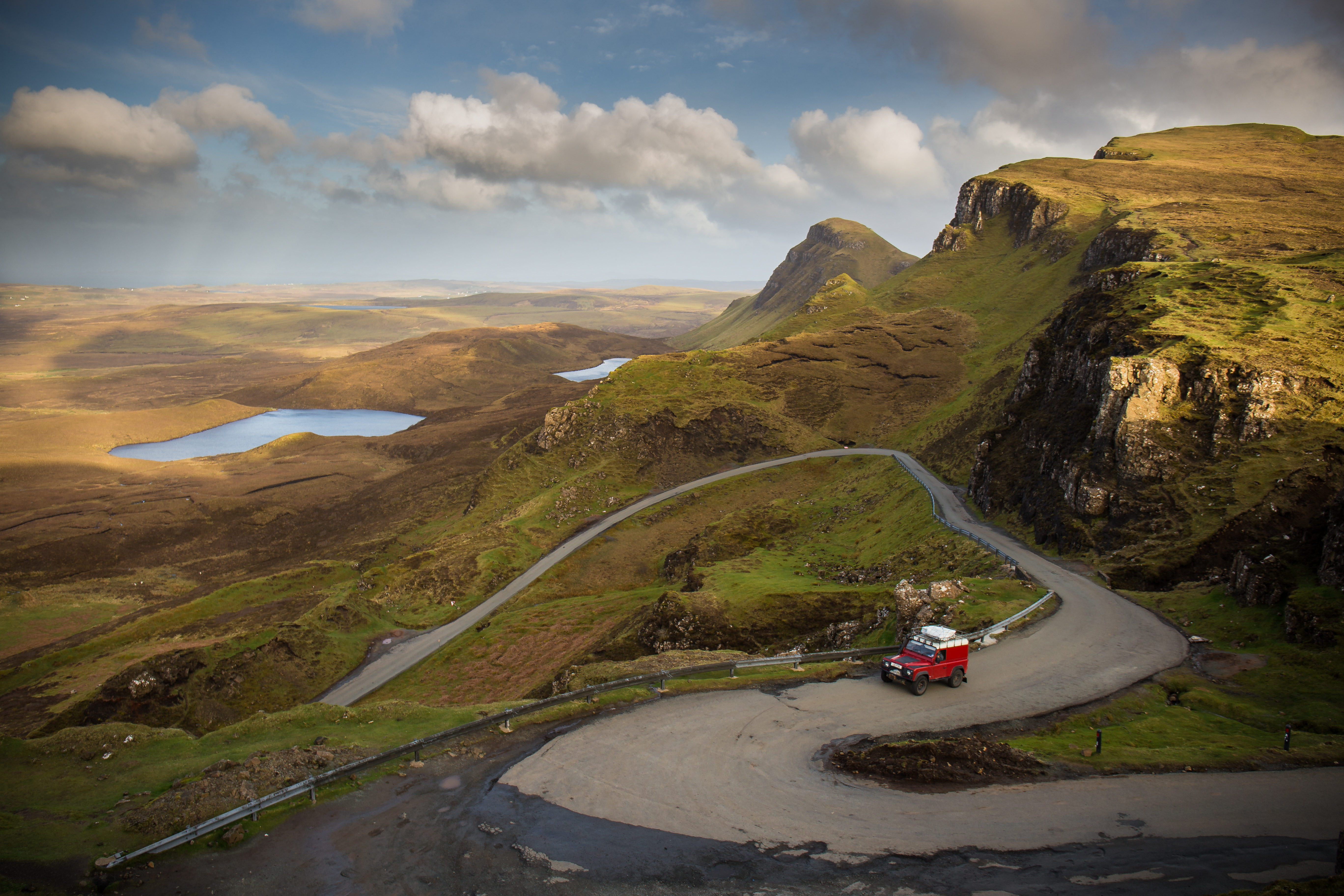 Le Quiraing, île de Skye